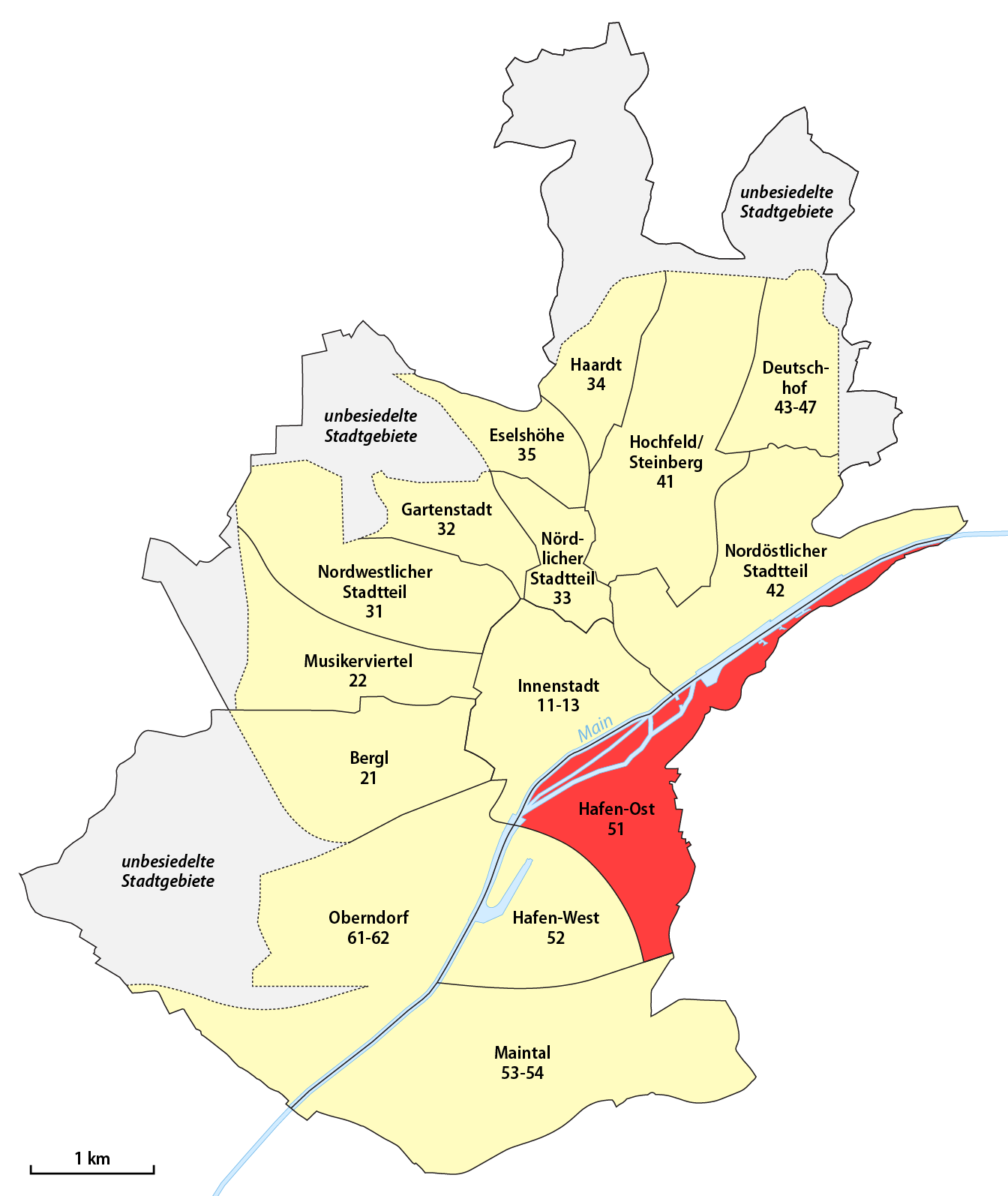 Karte der Stadtgliederung der Stadt Schweinfurt: Stadtteil Hafen-Ost